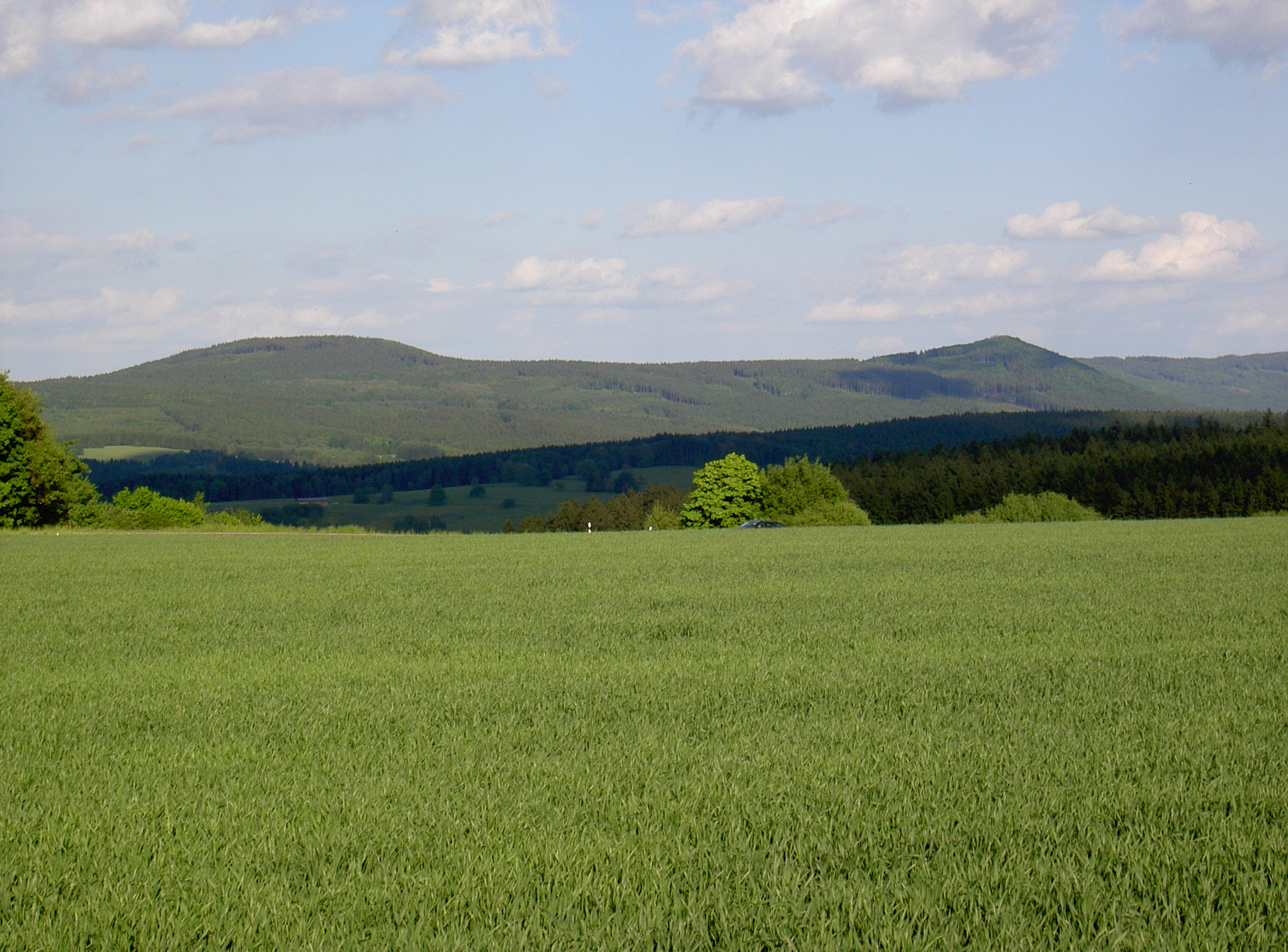 Lysá hora (Český les), Lissaberg (Oberpfälzer Wald) und Starý Herštejn (rechts)